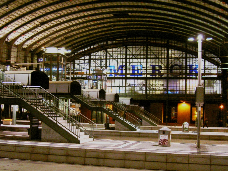 Darmstadt Hbf eigenes Foto 23.11.2004 Aufnahme :de:Benutzer:Heidas|Heidas (?)